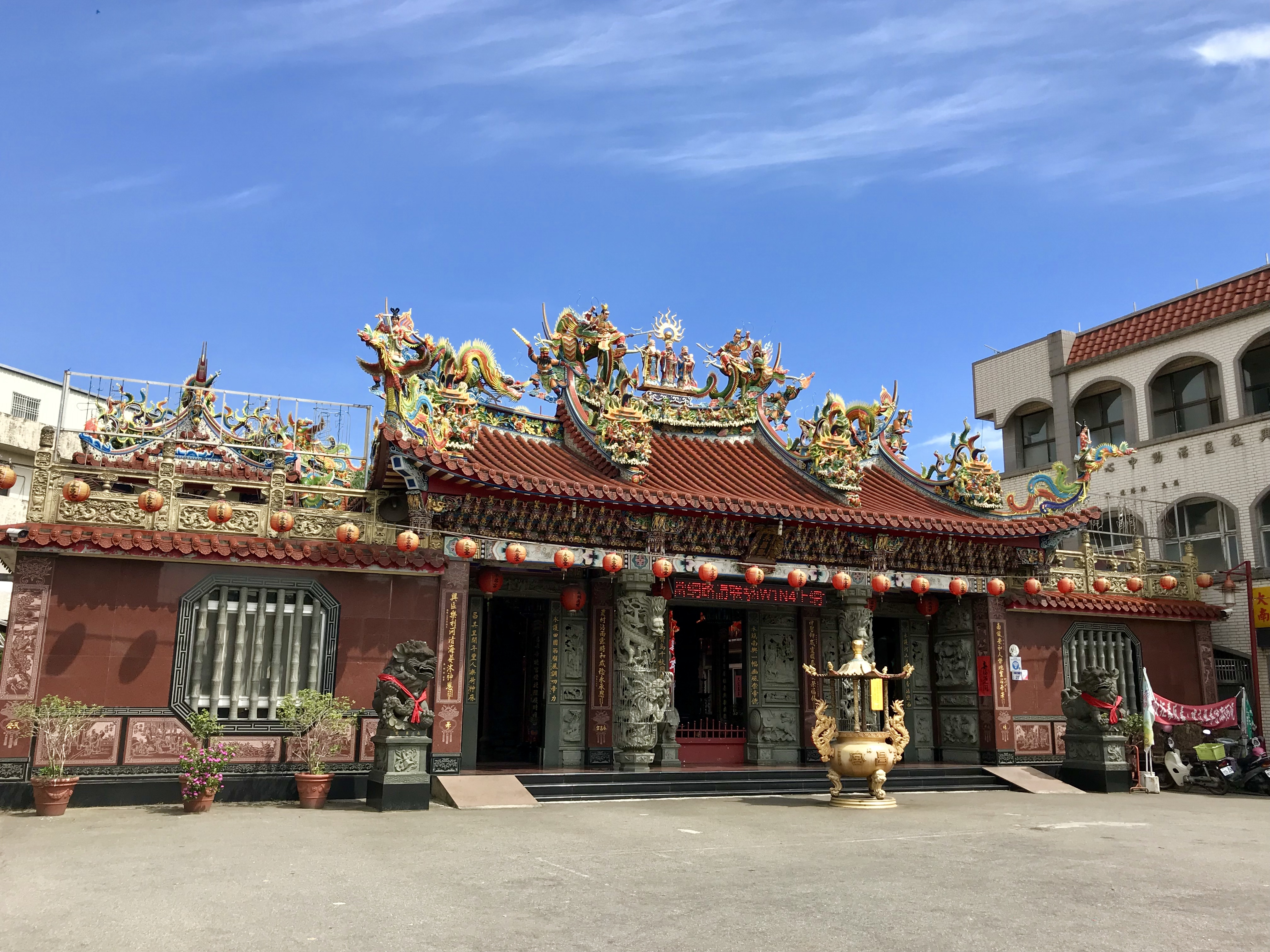 中文（台灣）: 大溪永昌宮斜照